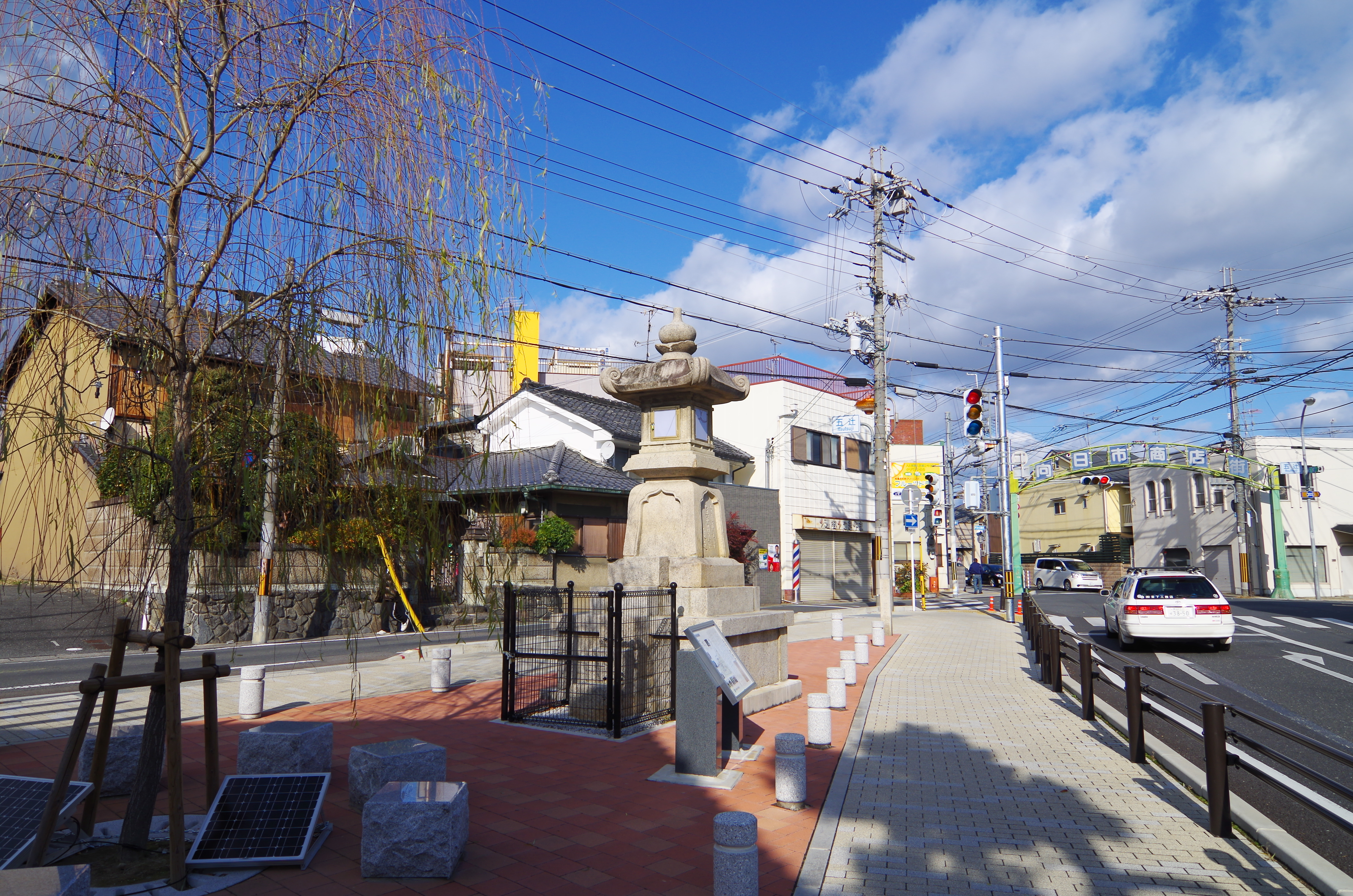 五辻の常夜灯 2013.12.23